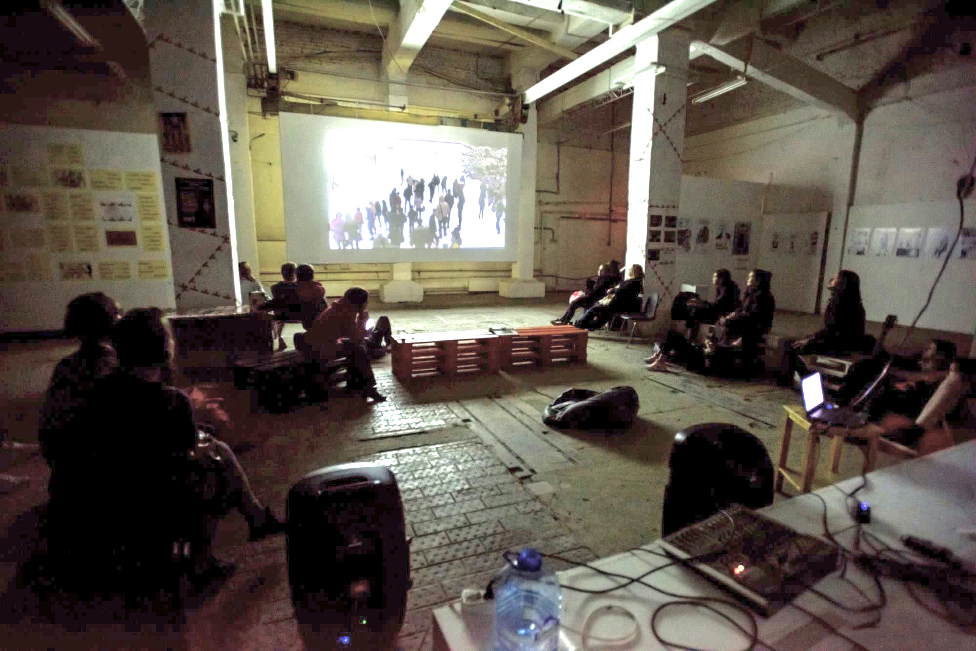 видеопоказ нафестивале Медиаудар. ЦТИ Фабрика. 090916